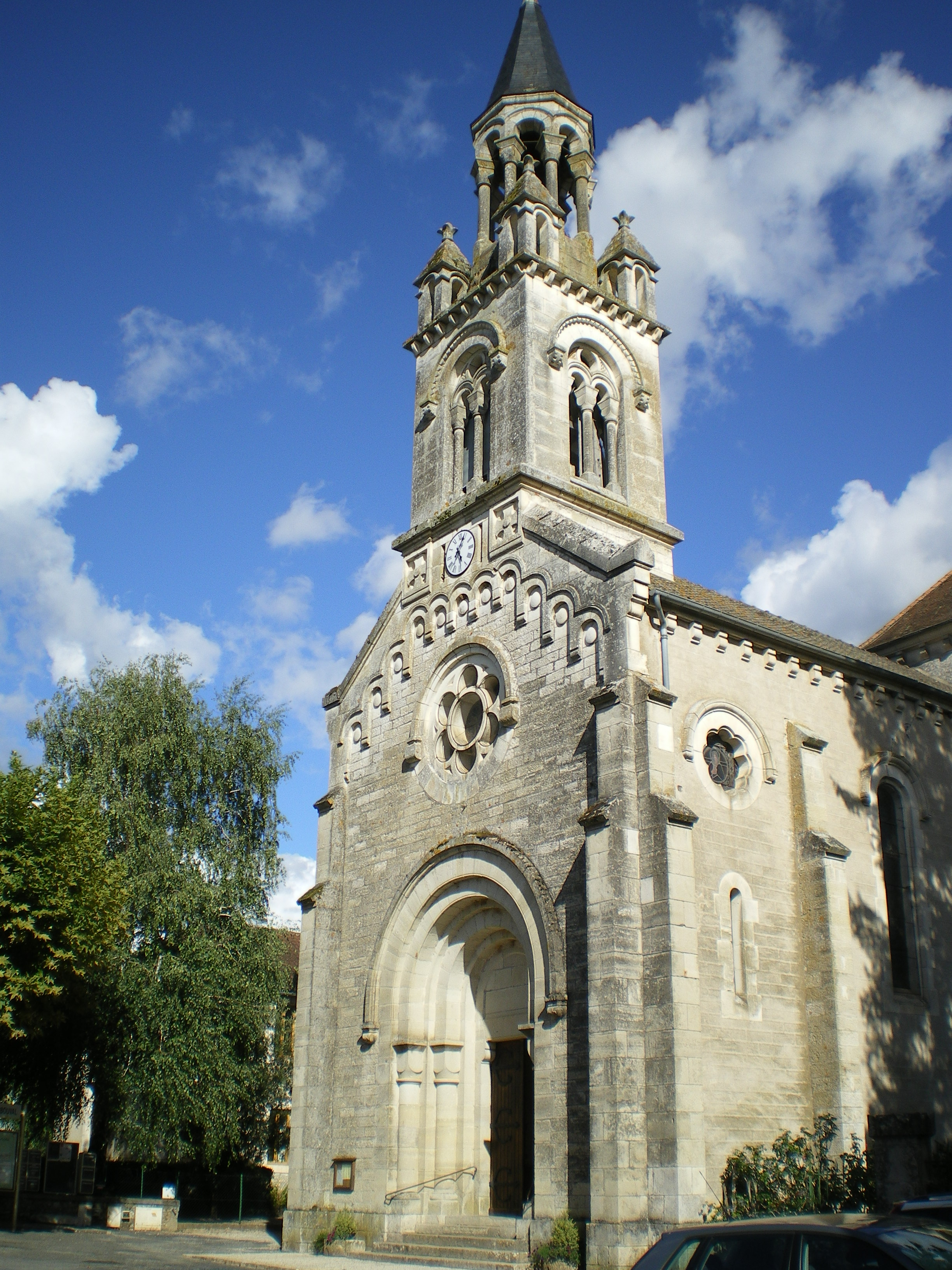 Église de Saint-Martin-Labouval, Lot, France